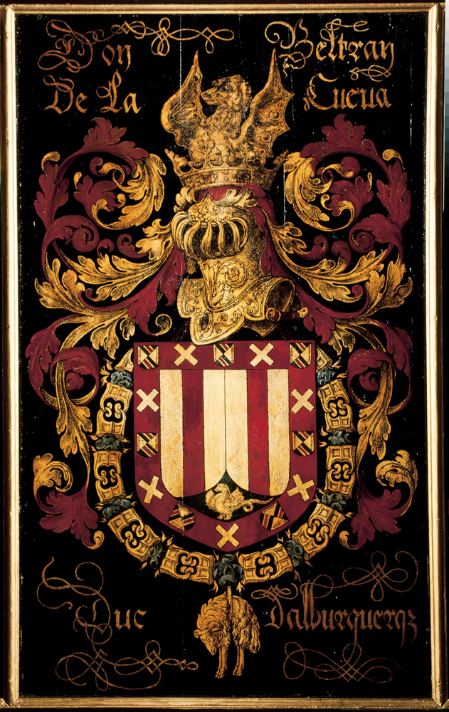 schilder uit Valenciennes; vermoedelijk Jacques Le Boucq, Blazoen van het 23ste Gulden-Vlieskapittel, 1559, Don Bertran de la Cueva; inv: 433 N.174